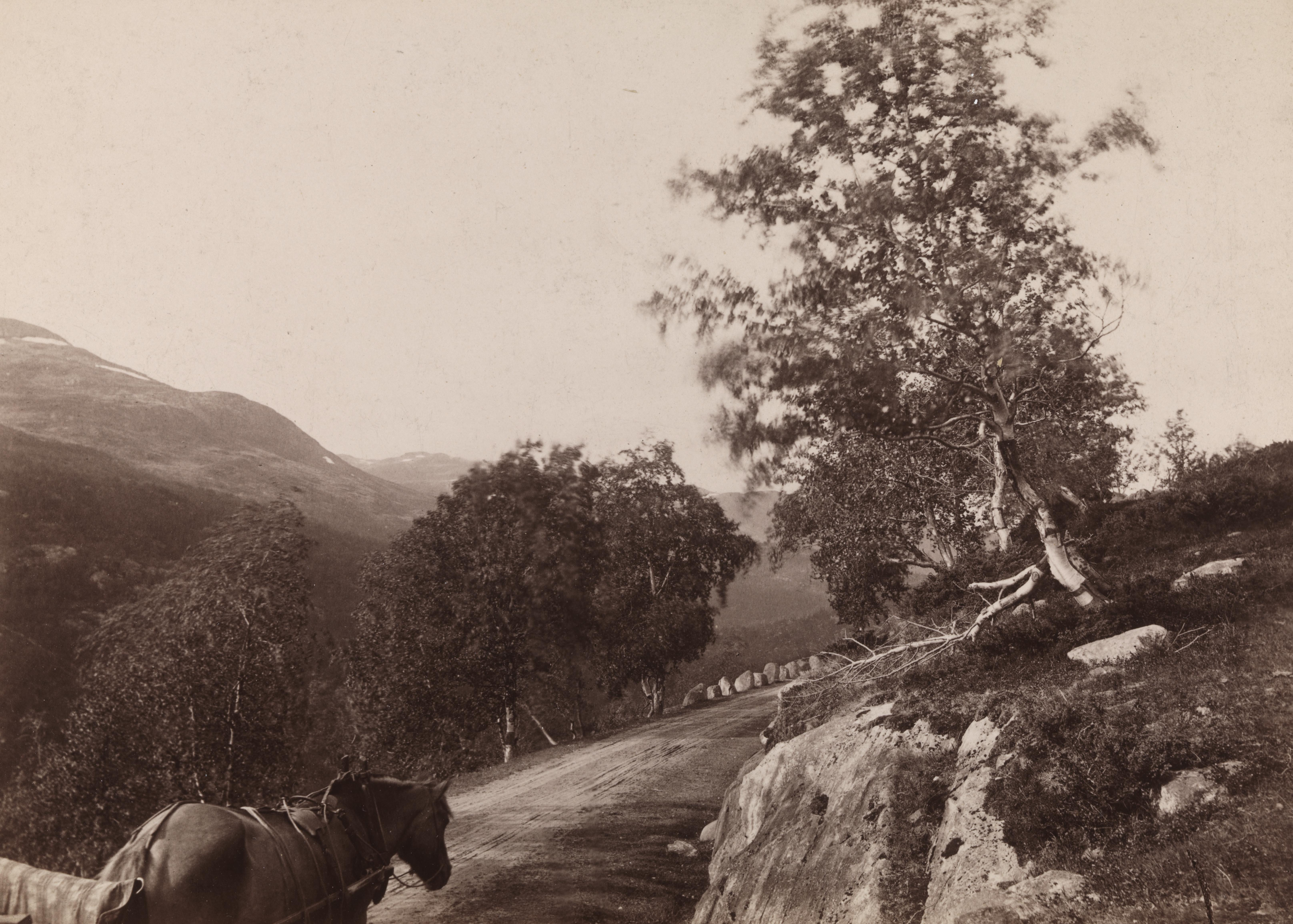 Sted: Filefjell Kommune: Fylke: Oppland Tagger: hester veier landskapsfotografi samferdselsfotografi